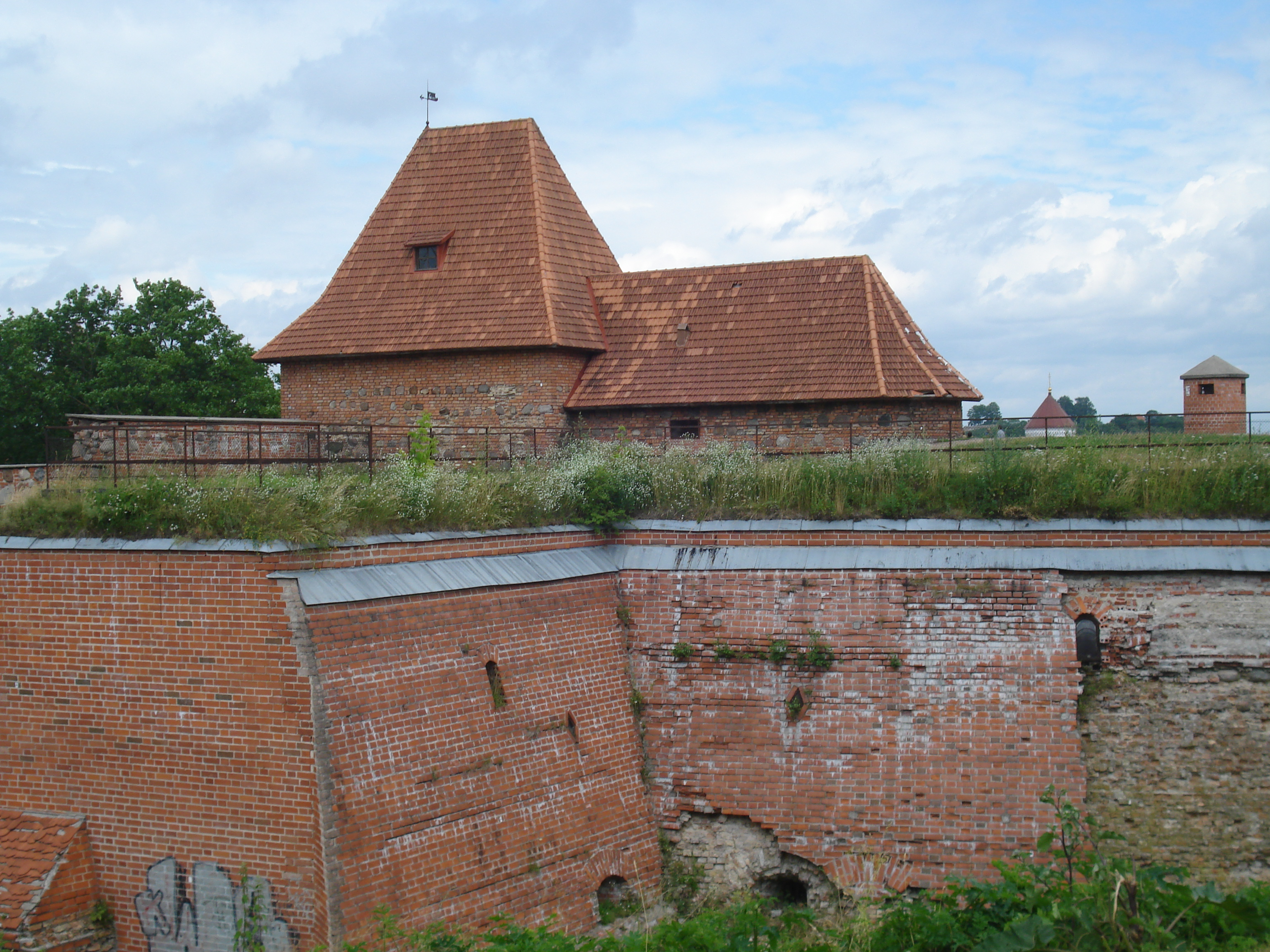 Barbican in Vilnius (Bokšto g. 6).